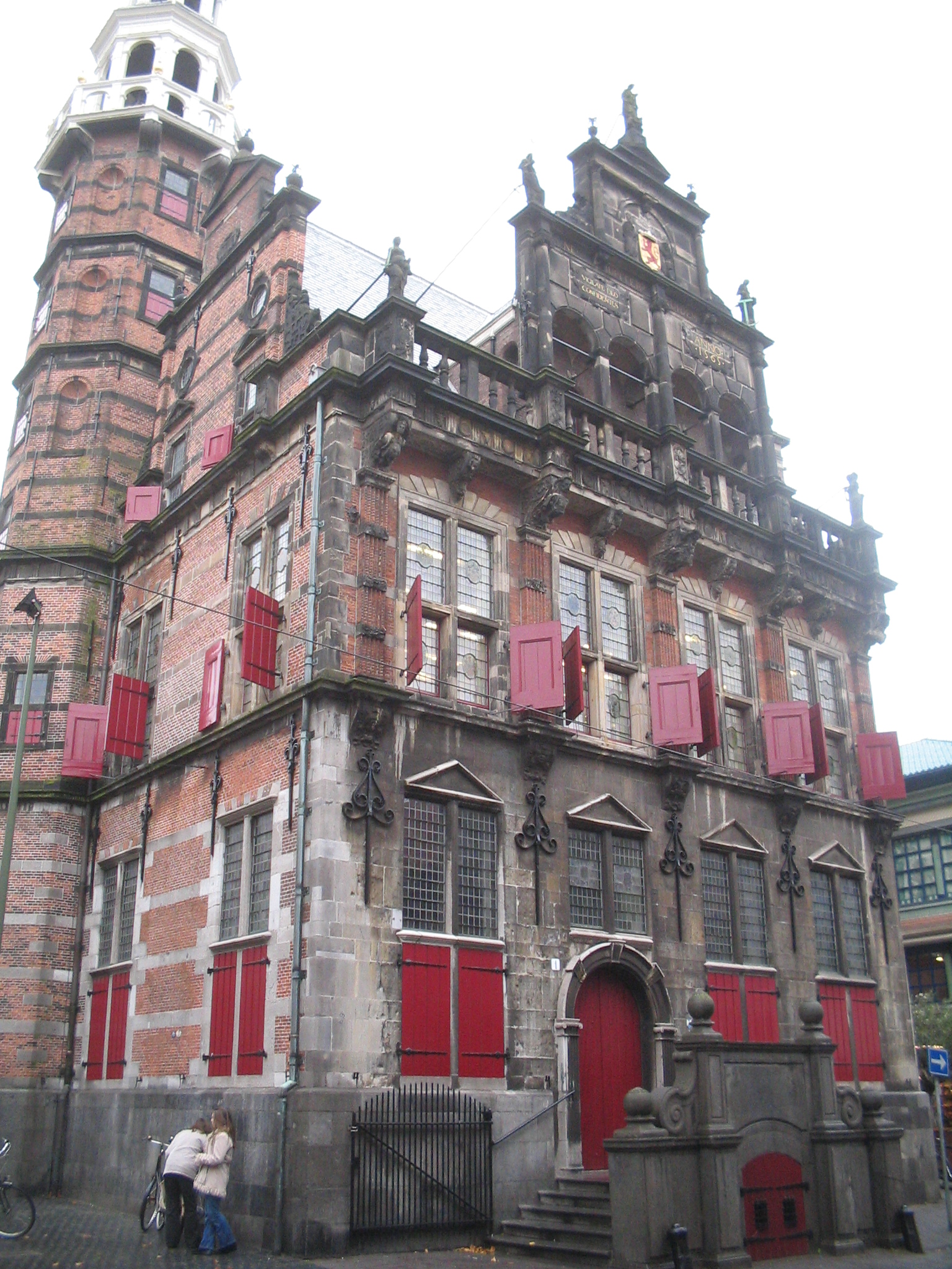 oude stadhuis Den Haag, Netherlands, 21 oktober 2005